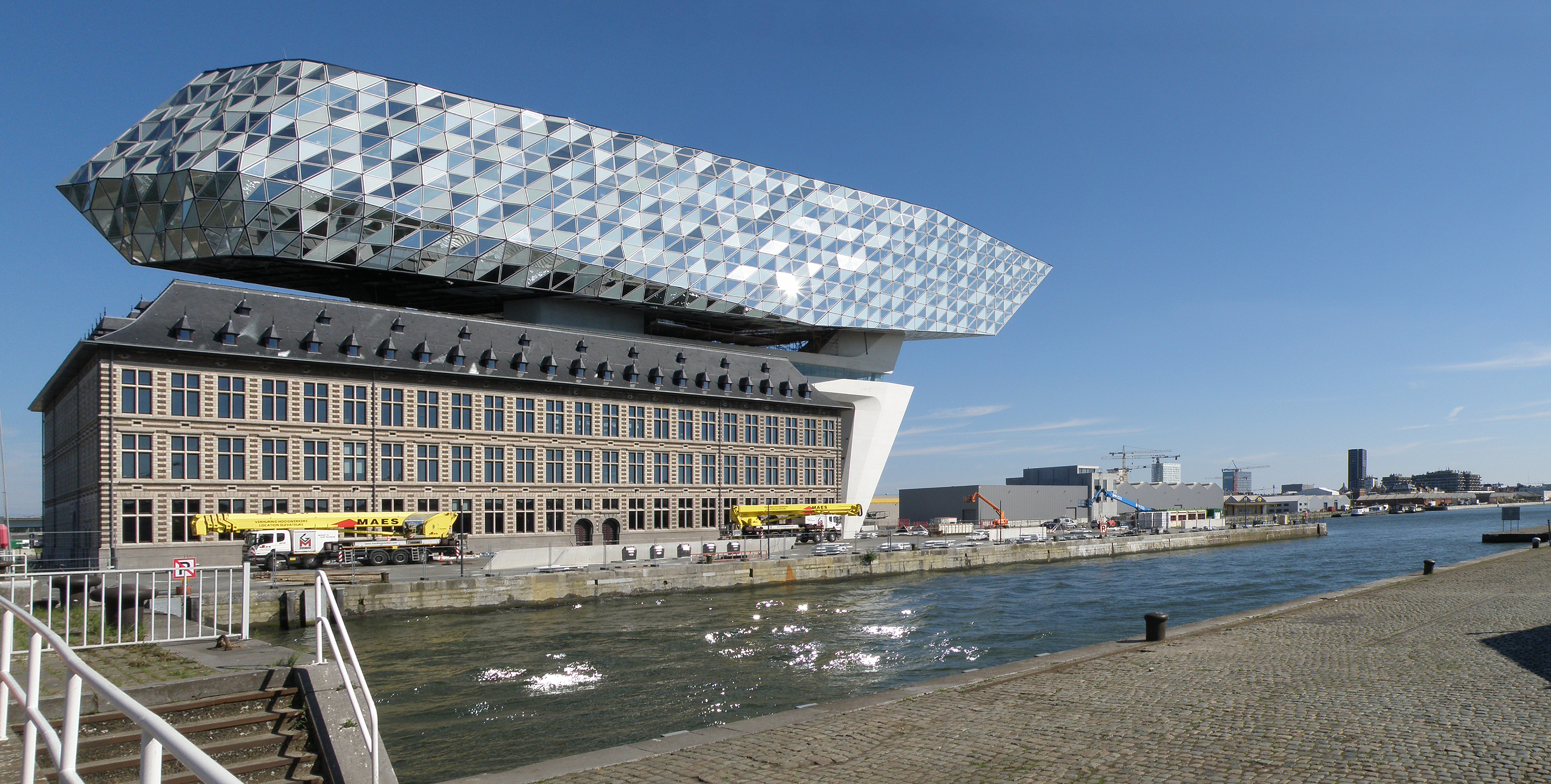 Antwerpen (België). Havenhuis, aan het Kattendijkdok.